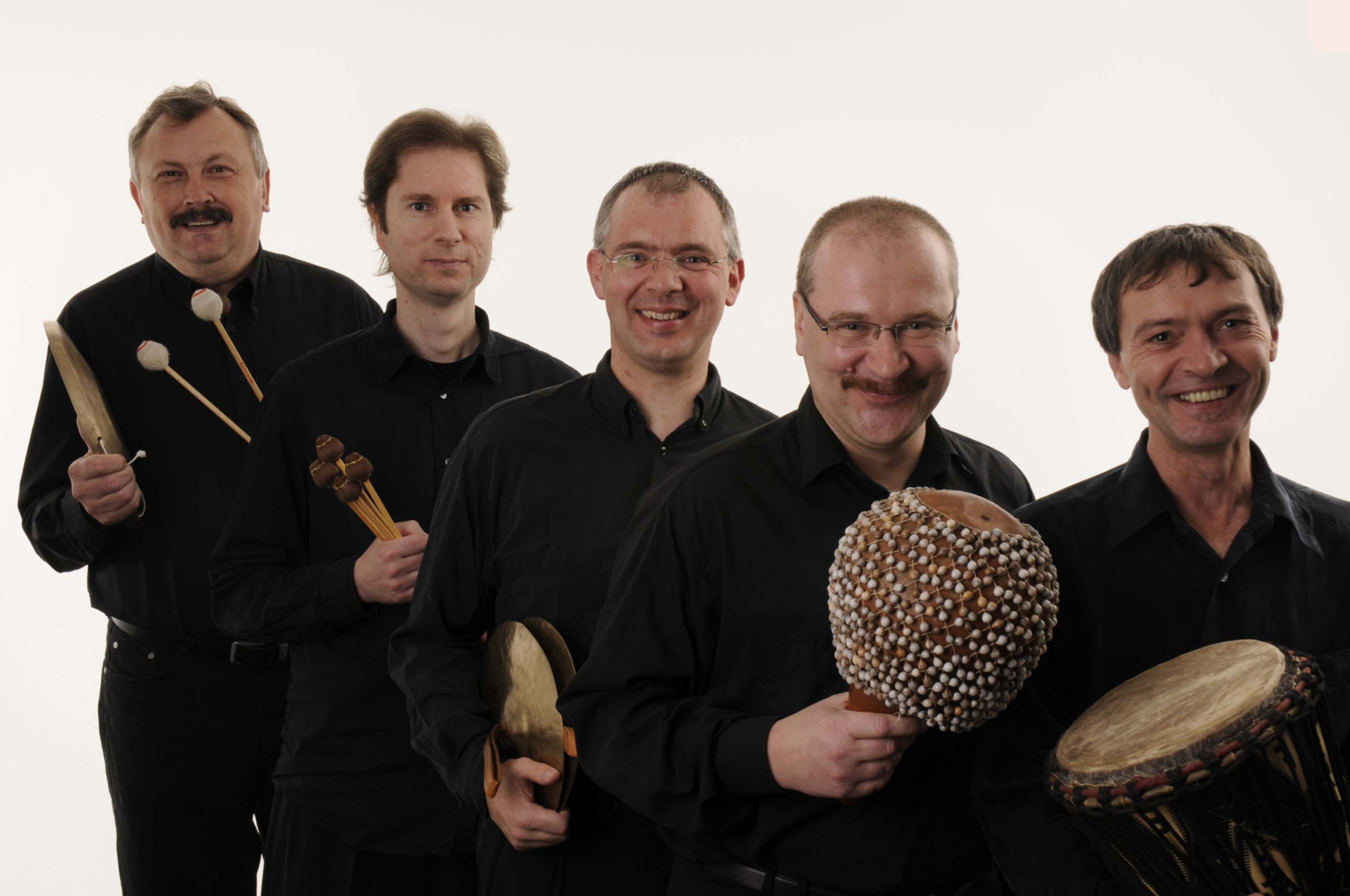 Das Leipziger Schlagzeugensemble. Personen von links nach rechts: Gerd Schenker, Sven Pauli, Thomas Winkler, Stefan Stopora, Winfried Nitzsche